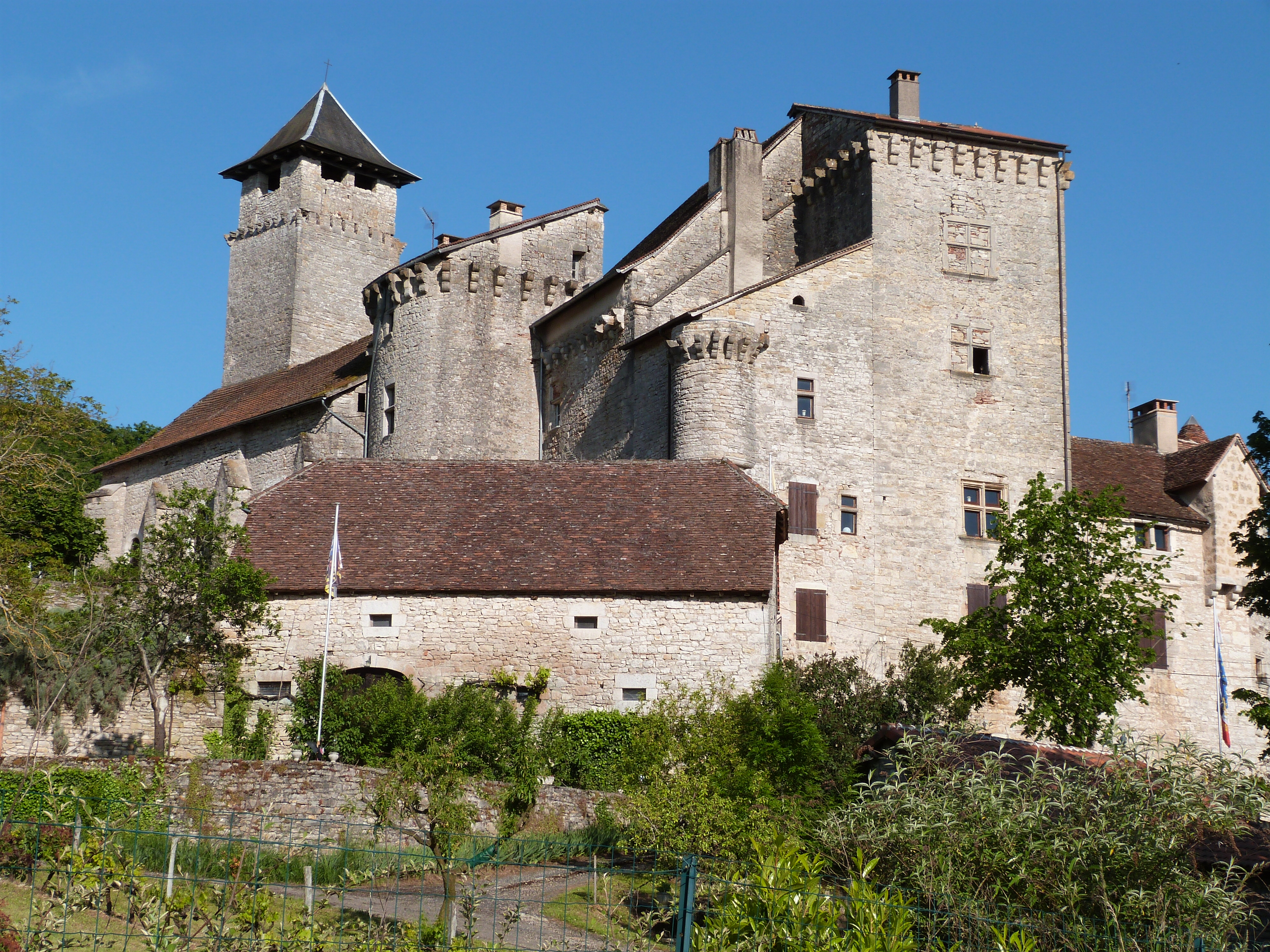 Château de Salvagnac-Cajarc (InscritClassé) .